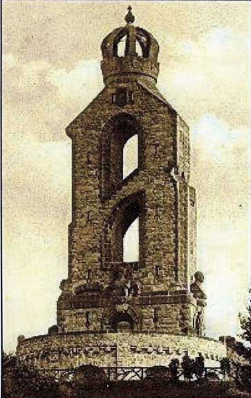 Postkarte "Bismarksäule im Stadtwald"